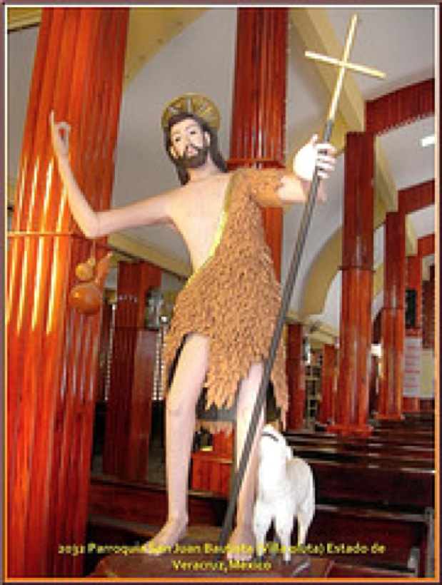 San Juan Baustista